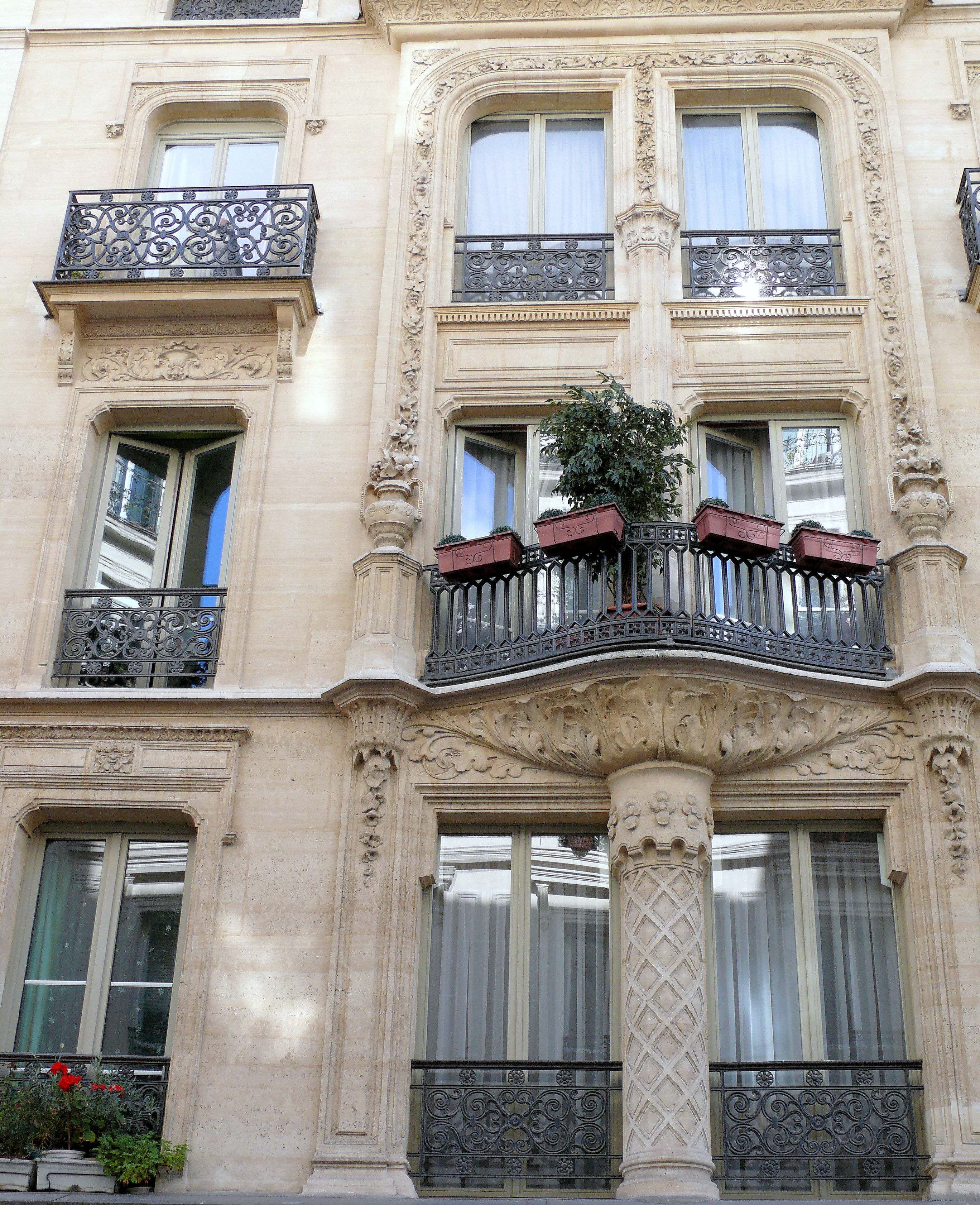 Paris 9ème arondissement - Immeuble 25 rue Victor Massé